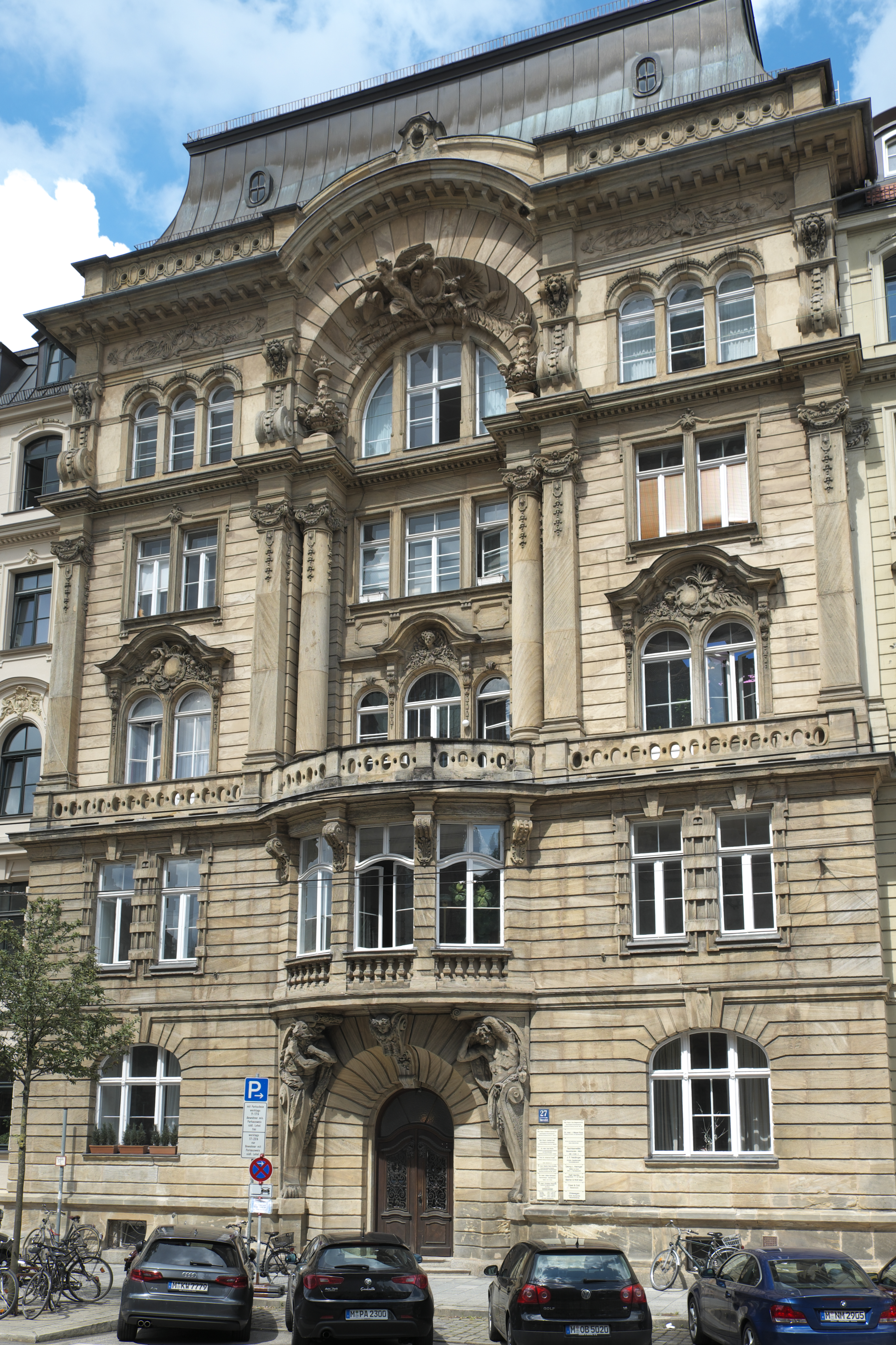 Mietshaus in der Thierschstraße 27 im Lehel im Stadtbezirk Altstadt-Lehel in München (Bayern/Deutschland), 1889 von Albin Lincke und Max Littmann gebaut